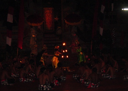 投稿者自身による撮影 。ケチャダンス。